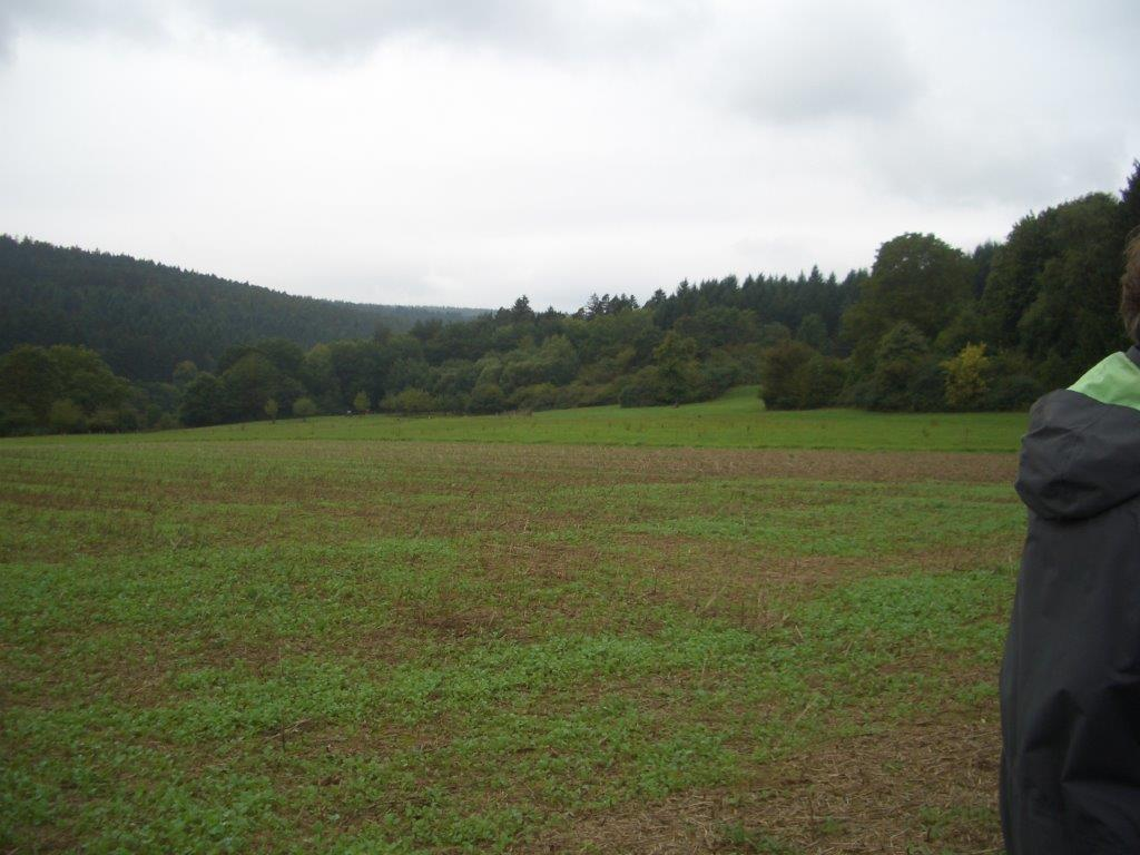 Mittelalterliche und neuzeitliche Abraumhalden bei Steinbach